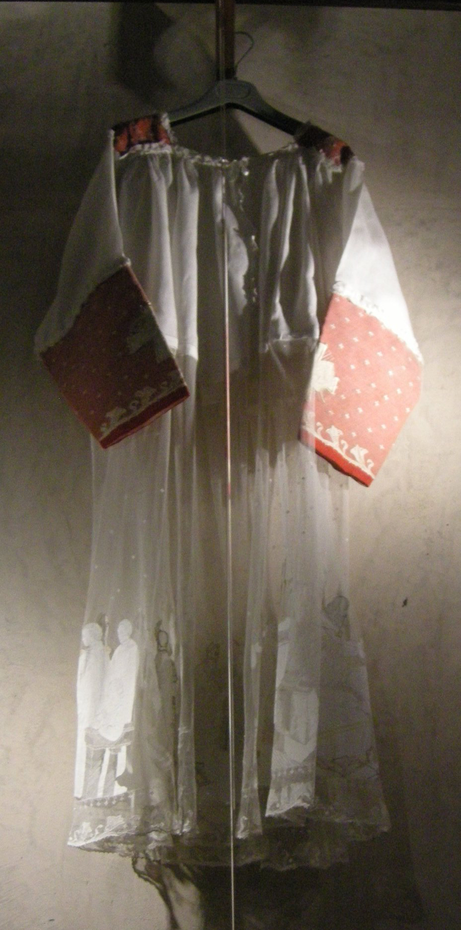 Museo di sant'ambrogio, veste di cardinale Alfredo Ildefonso Schuster